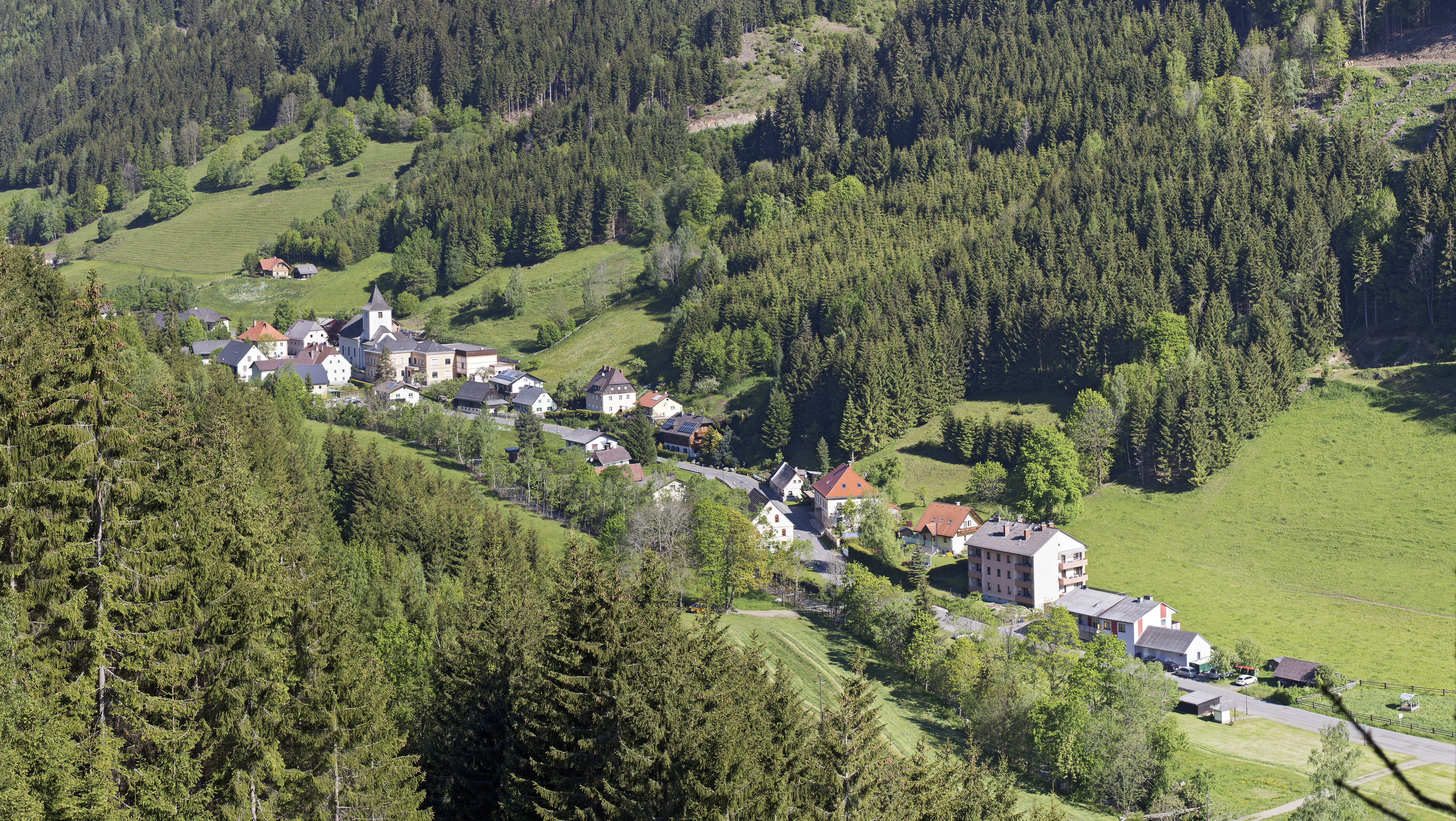 Blick auf den Ort Gaal von Südost